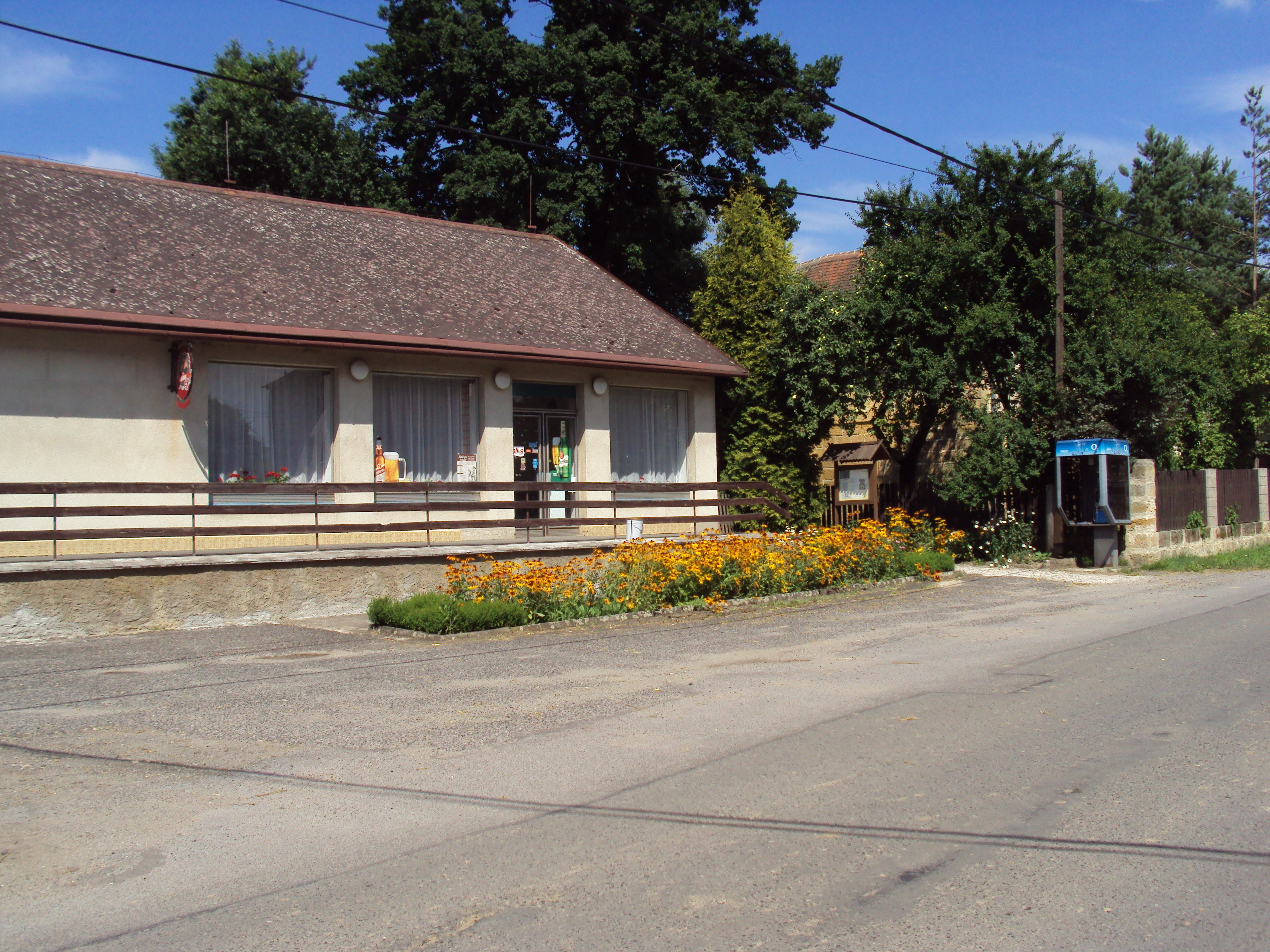 Obchod, telefonní budka a infodeska, střed obce Kamenice